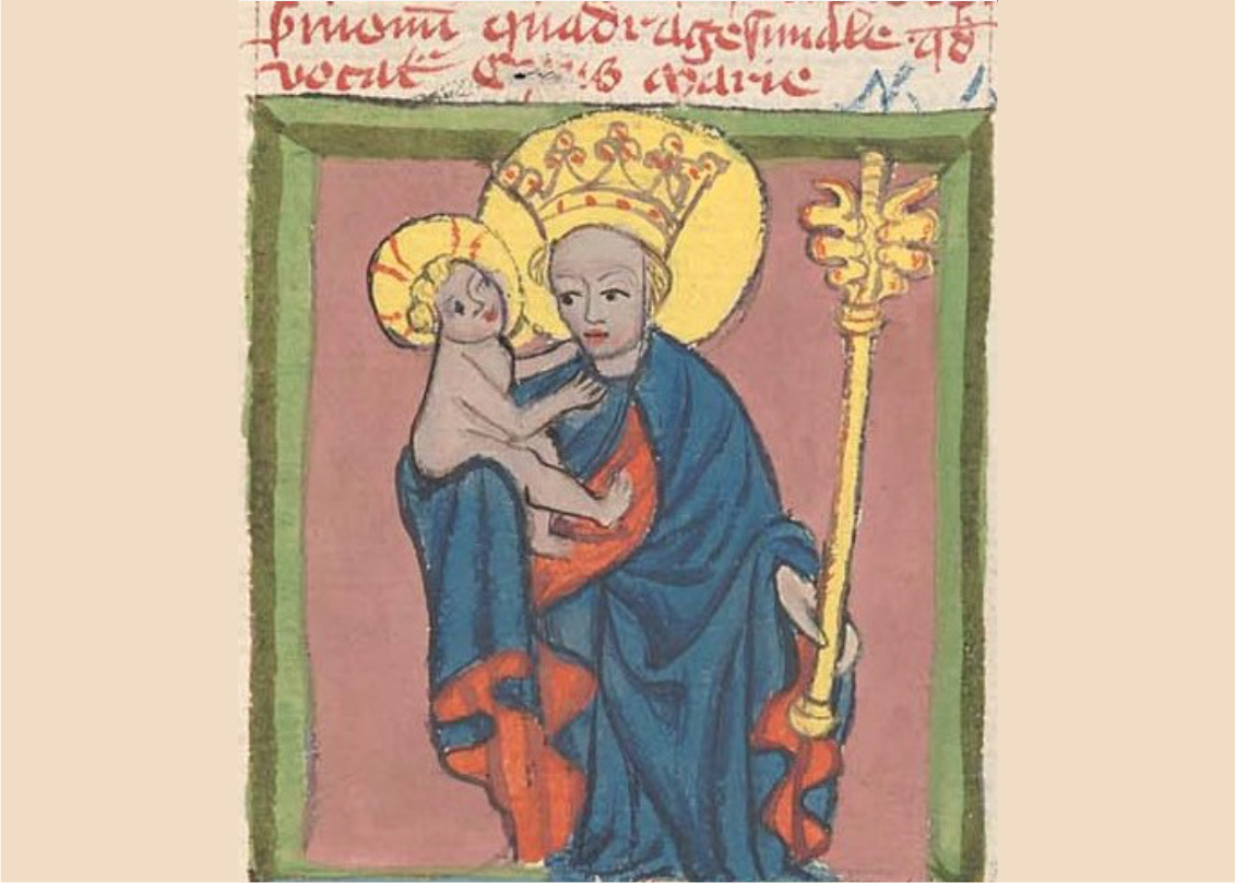 Ukázka z rukopisu Blažka z Dobřan